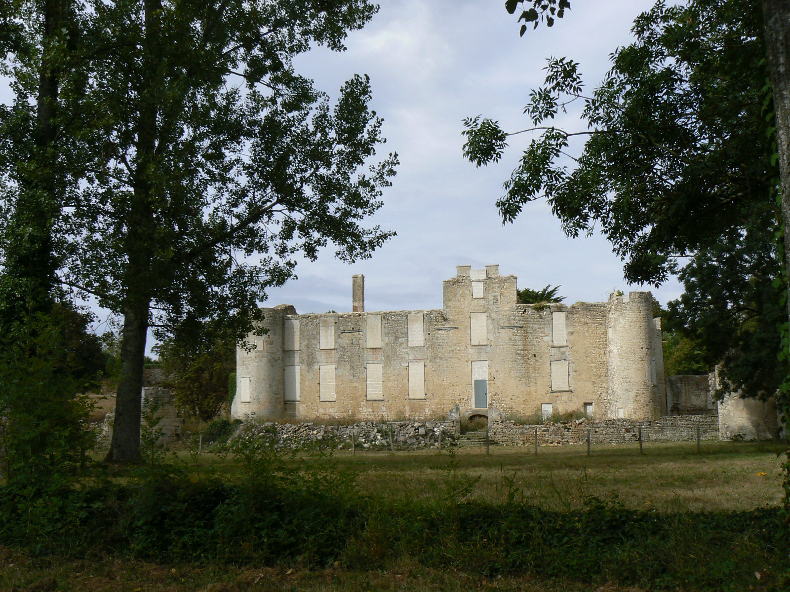 Château de Mursay, à Échiré (Deux-Sèvres, France), du côté de la Sèvre .